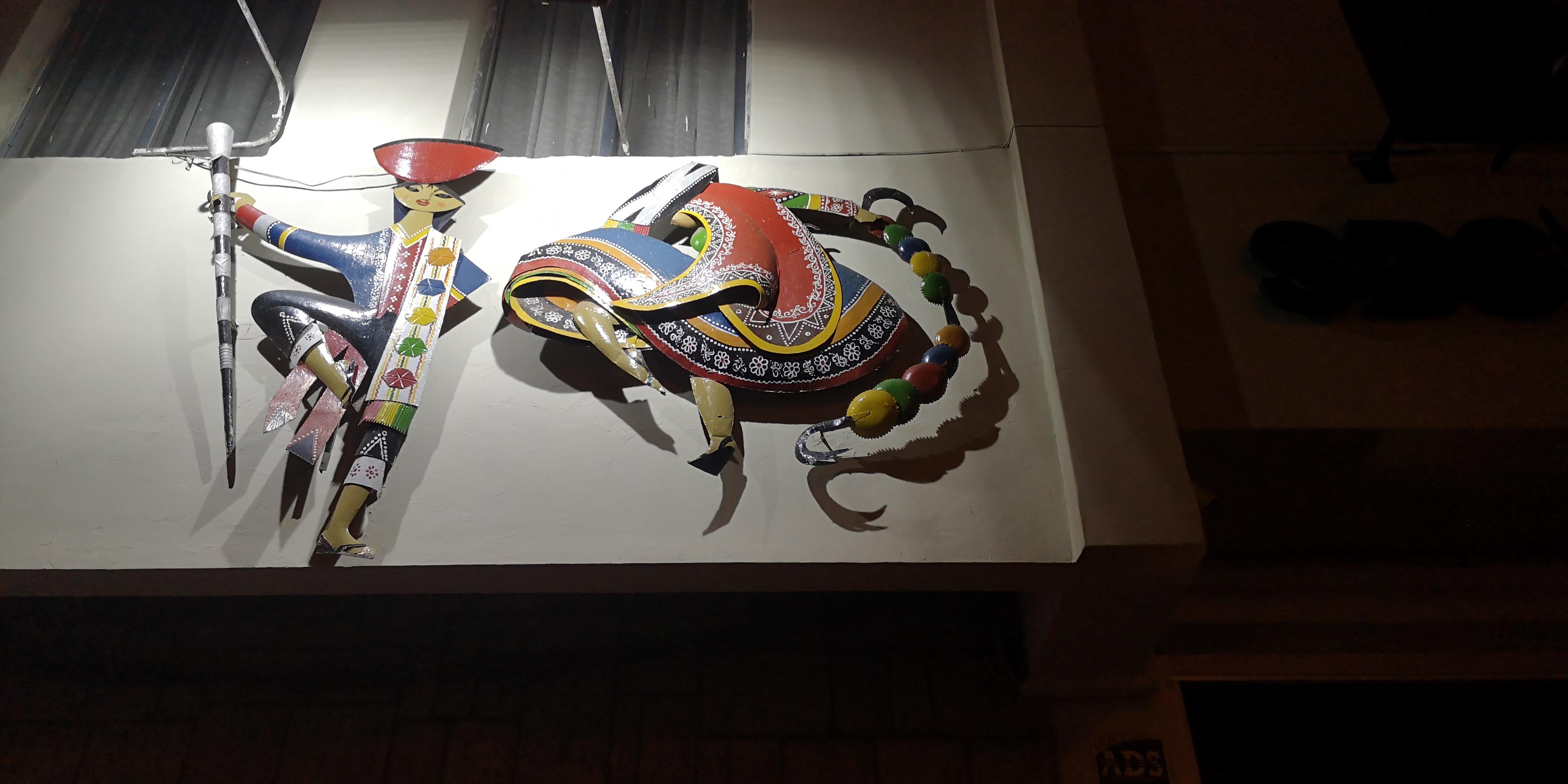 Vista del cartel del Centro Qosqo de Arte Nativo en el Cusco, Perú